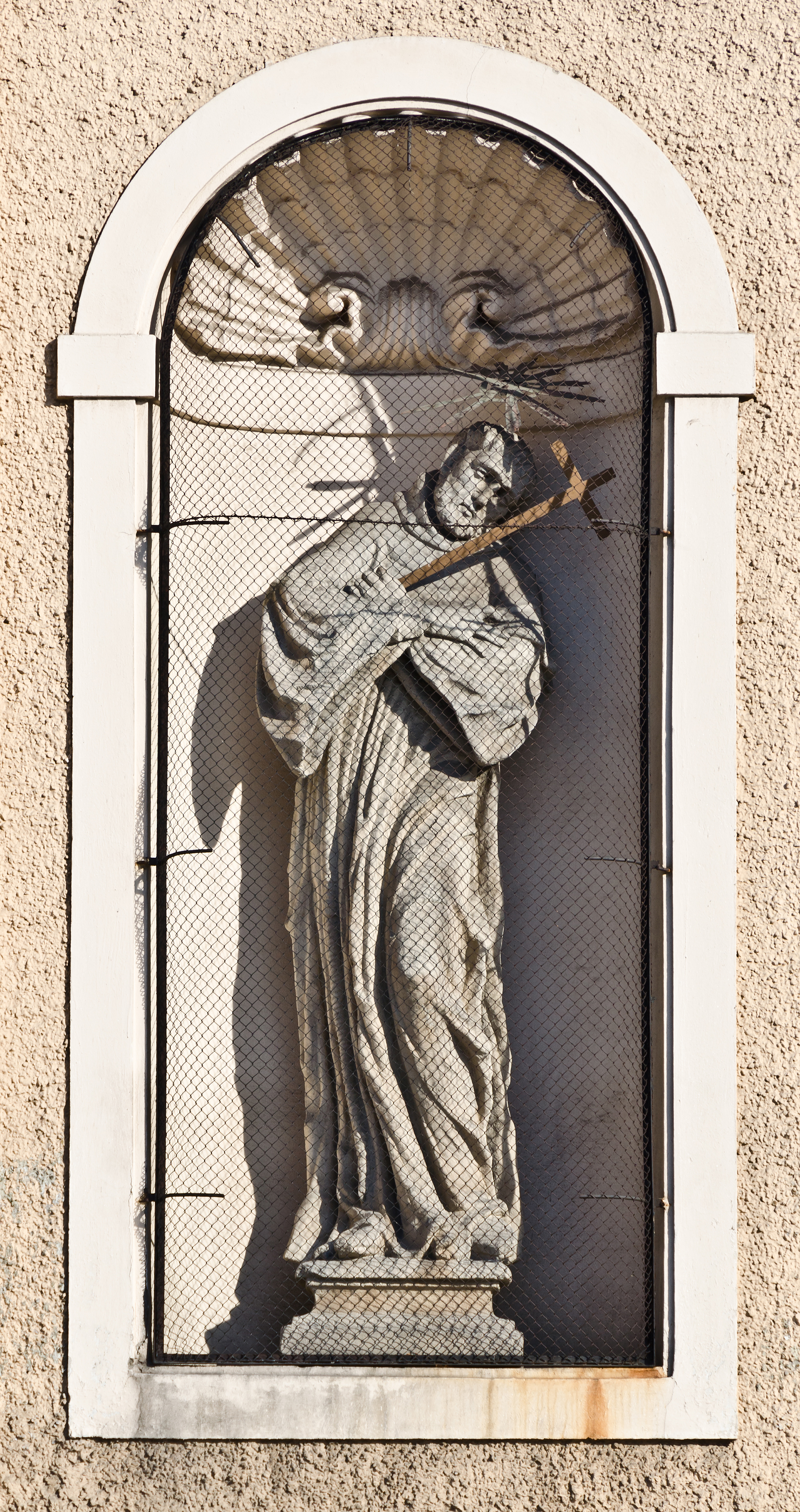 Kłodzko, kościół klasztorny Minorytów, nast. Franciszkanów, ob. parafialny p.w. MB Różańcowej, rzeźba na fasadzie